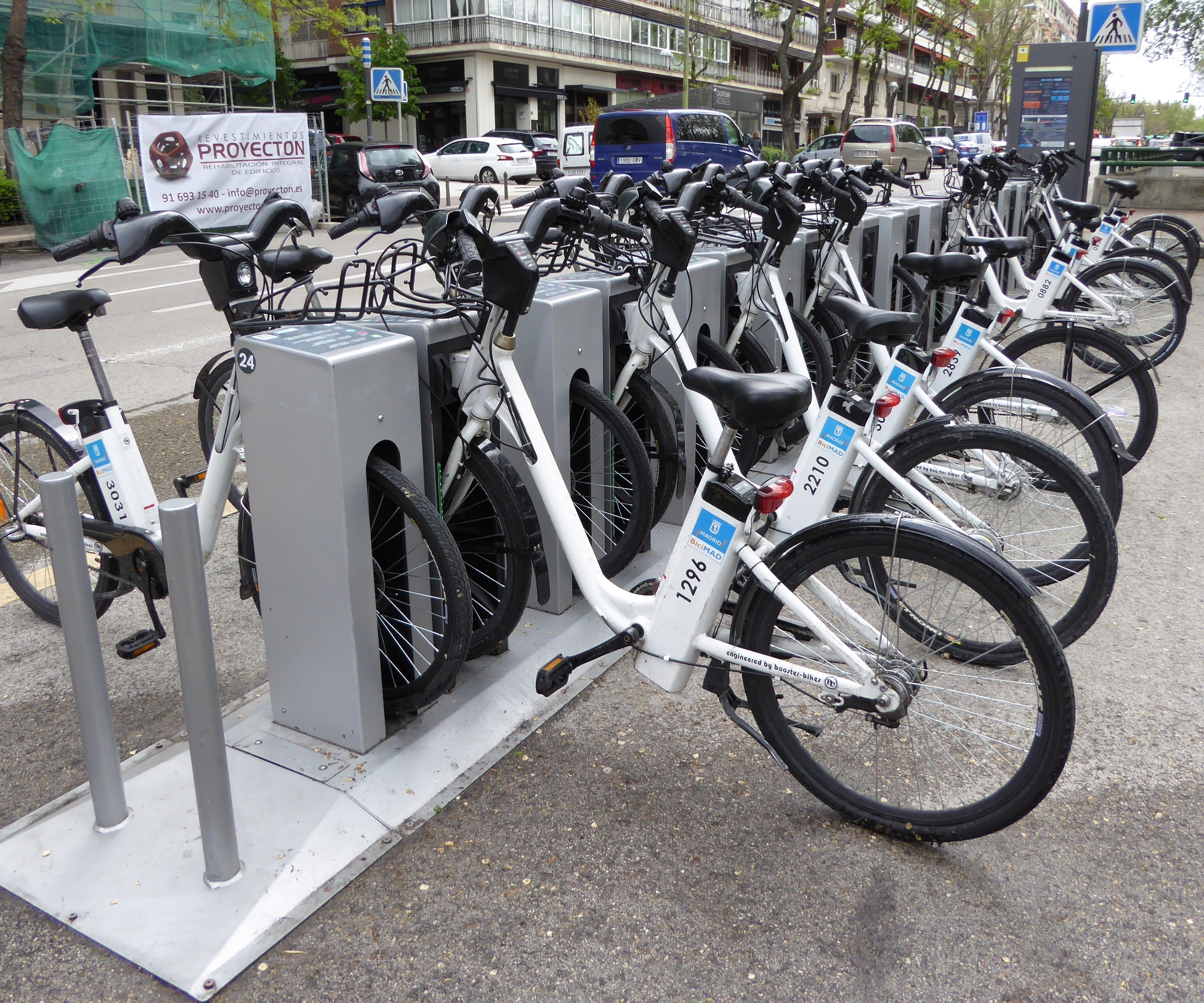 BiciMAD